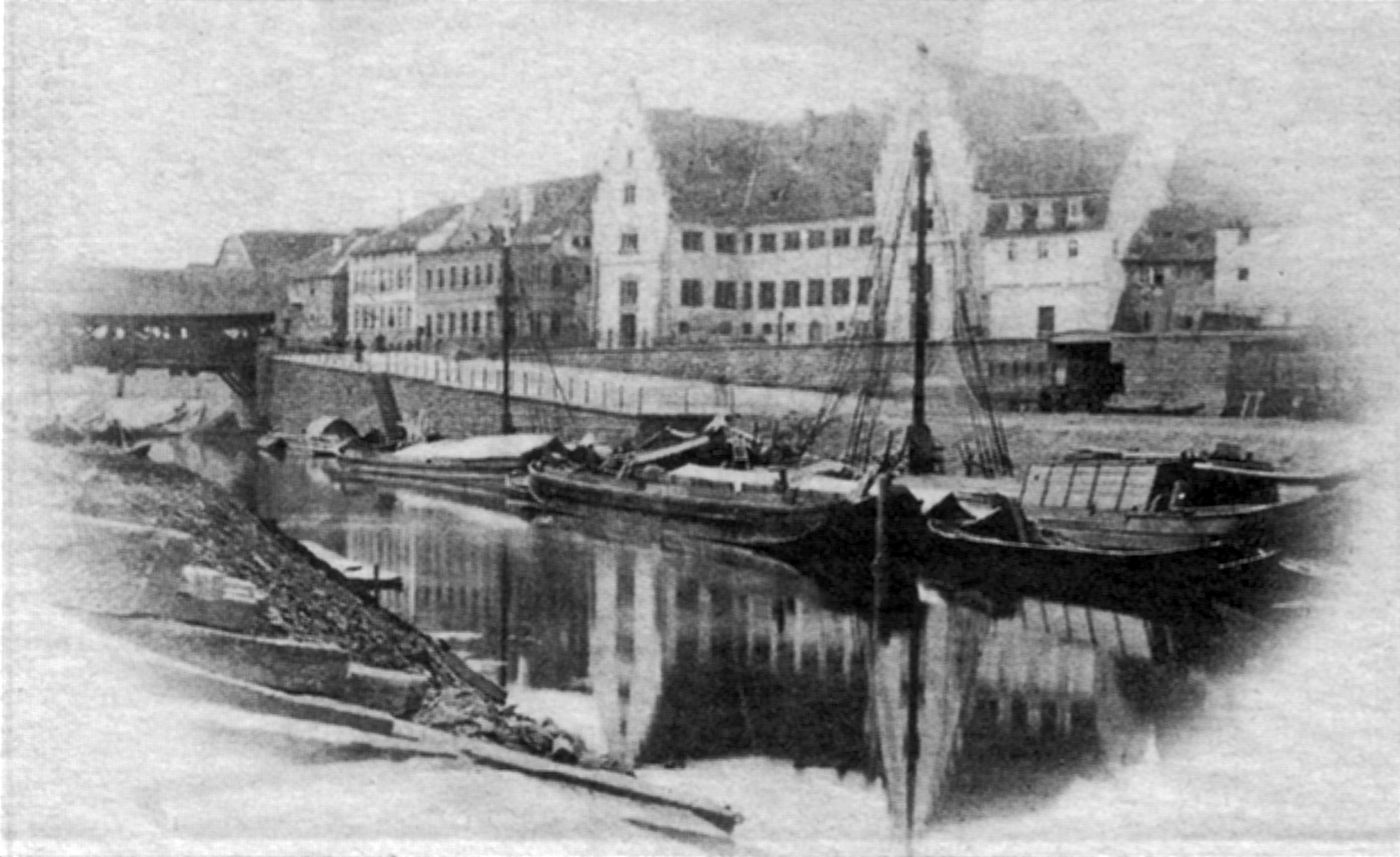 Blick auf das nach dem Bahnbau rückgebaute Hospital Wertheim, im Hintergrund die alte Tauberbrücke, Aufnahmedatum vor August 1870 (Visitformat)